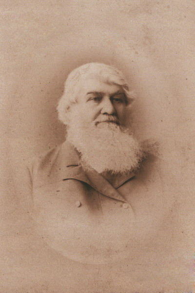 Сарапульский купец Ижболдин, Дмитрий Григорьевич